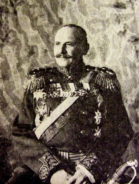 Начальник канцелярии министерства императорского двора, генерал-лейтенант Александр Александрович Мосолов (1854-1939)